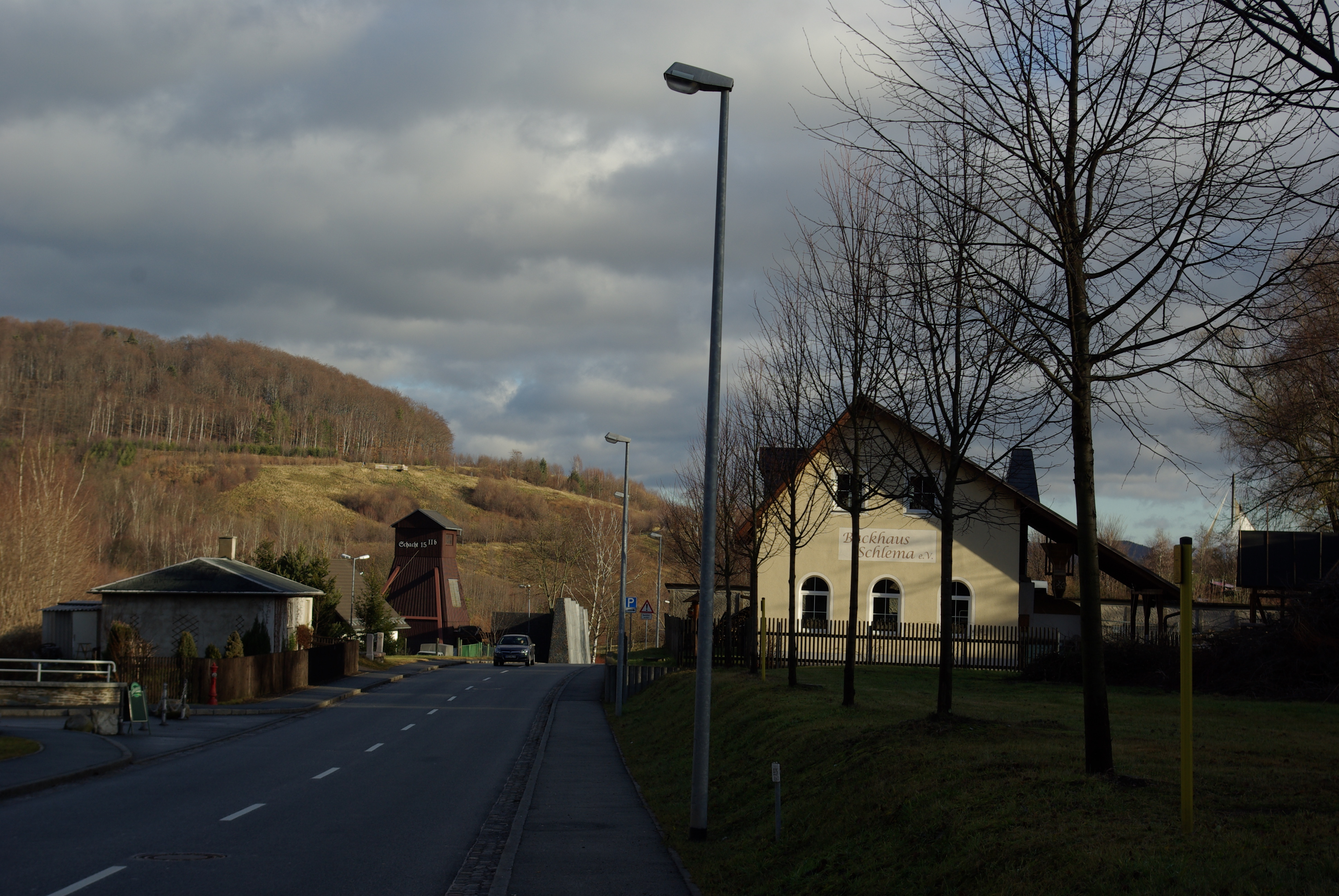 Backhaus Schlema